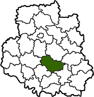 Tulchynskyi-Raion map